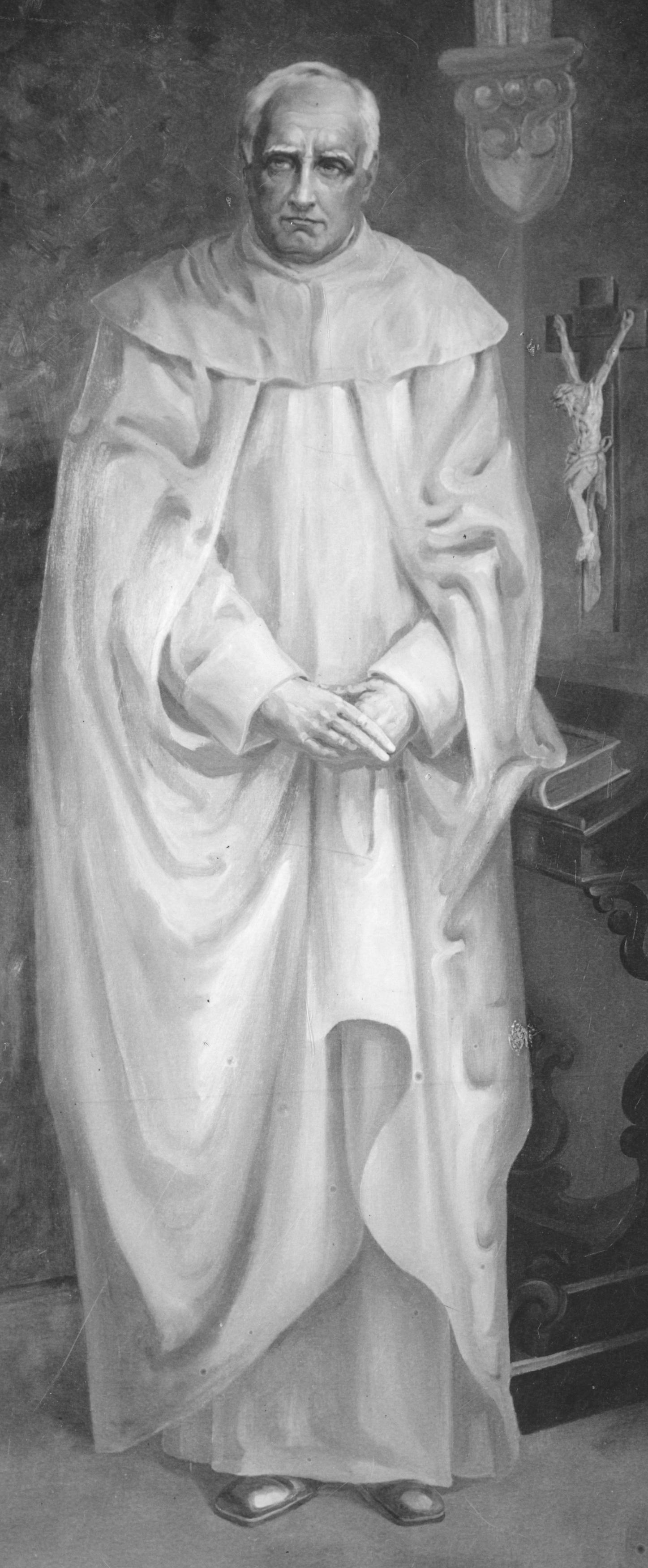 Portret generała zakonu paulinów na Jasnej Górze o. Justyna Wielońskiego. 1936 Sygnatura: 1-K-2273